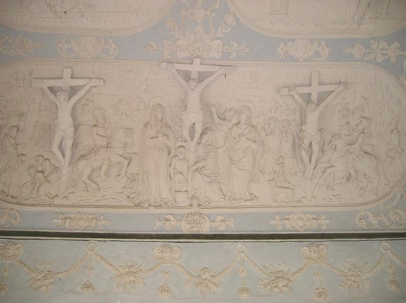 Cistercijanski samostan v Stični. Baročna štukatura v veži vhodnega stolpa, najstarejši figuralni štukaturni okras v Sloveniji (1620).